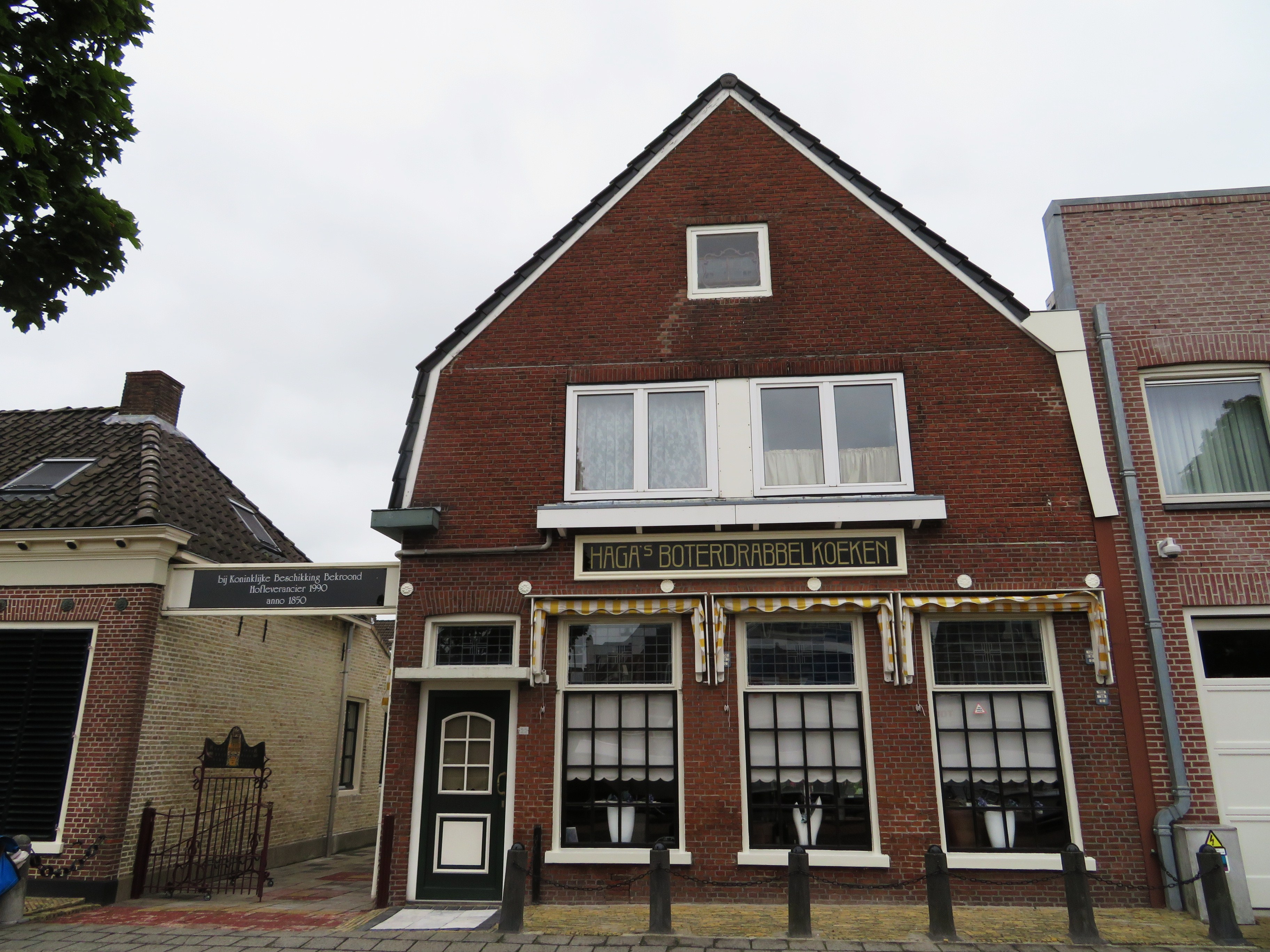 Fabriekje van Haga Friese Drabbelkoeken in Sneek.